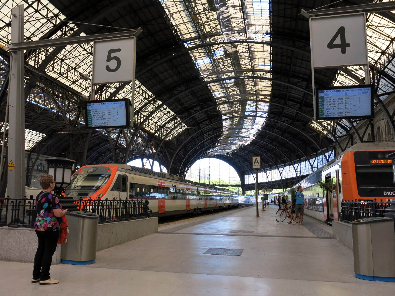 Estació de França (Barcelona) Object location41° 23′ 04.16″ N, 2° 11′ 06.35″ E